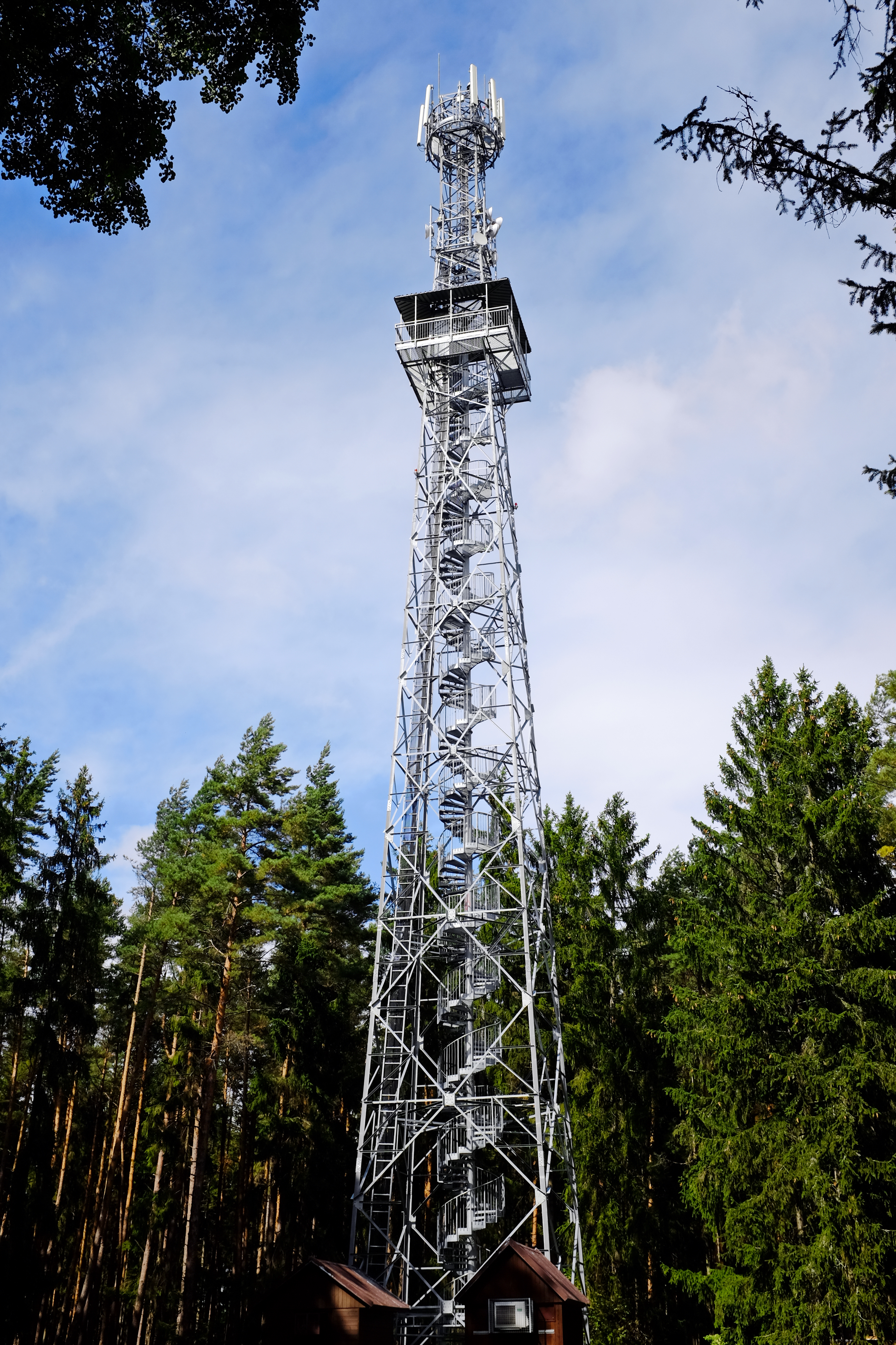 Rozhledna na Panském vrchu, Drmoul, Český les, okres Cheb